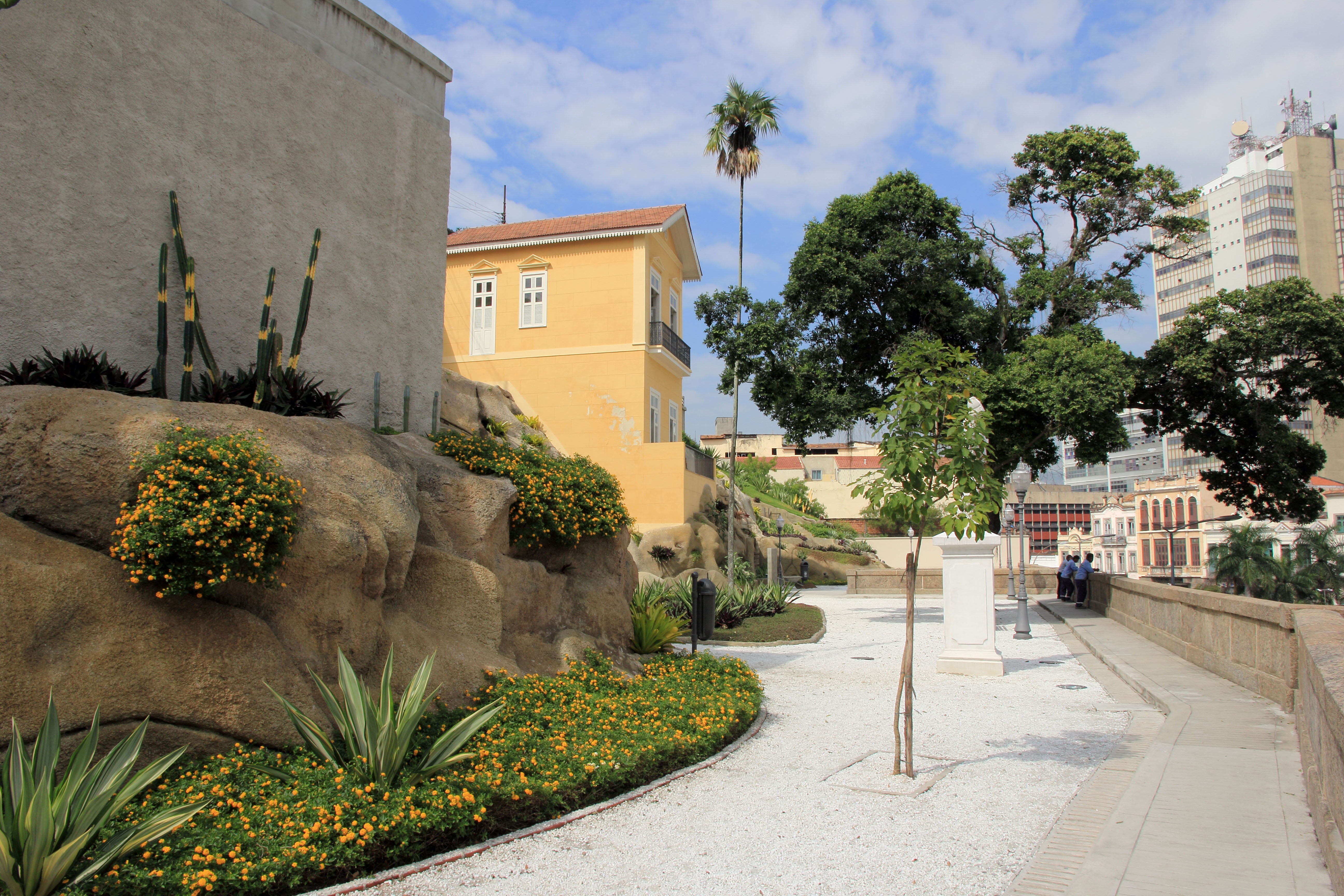 Jardim Suspenso do Valongo - Jardim e Casa da Guarda.